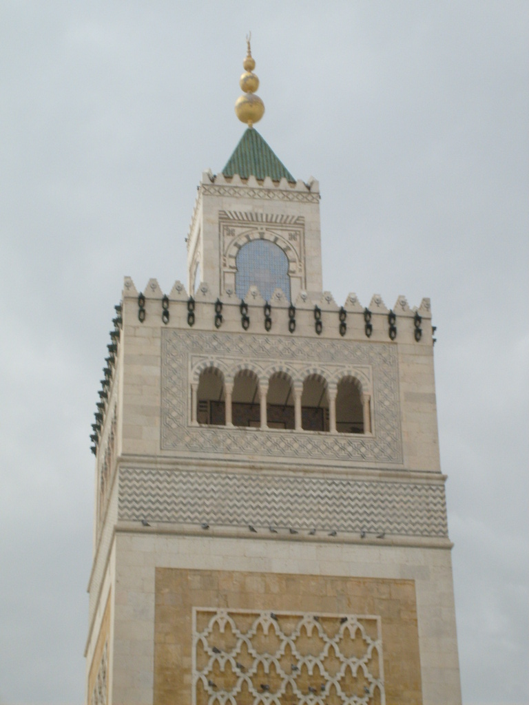 Détails du minaret de la mosquée Zitouna (Tunis)